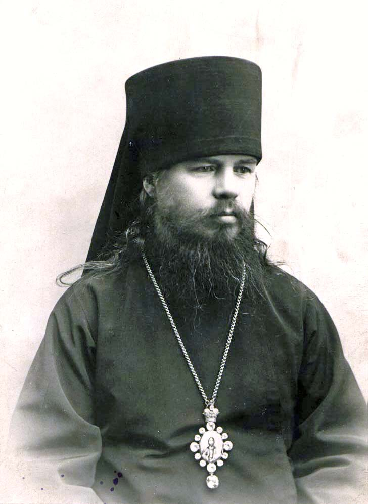 Мелетий епископ Якутский и Вилюйский 1912-1915